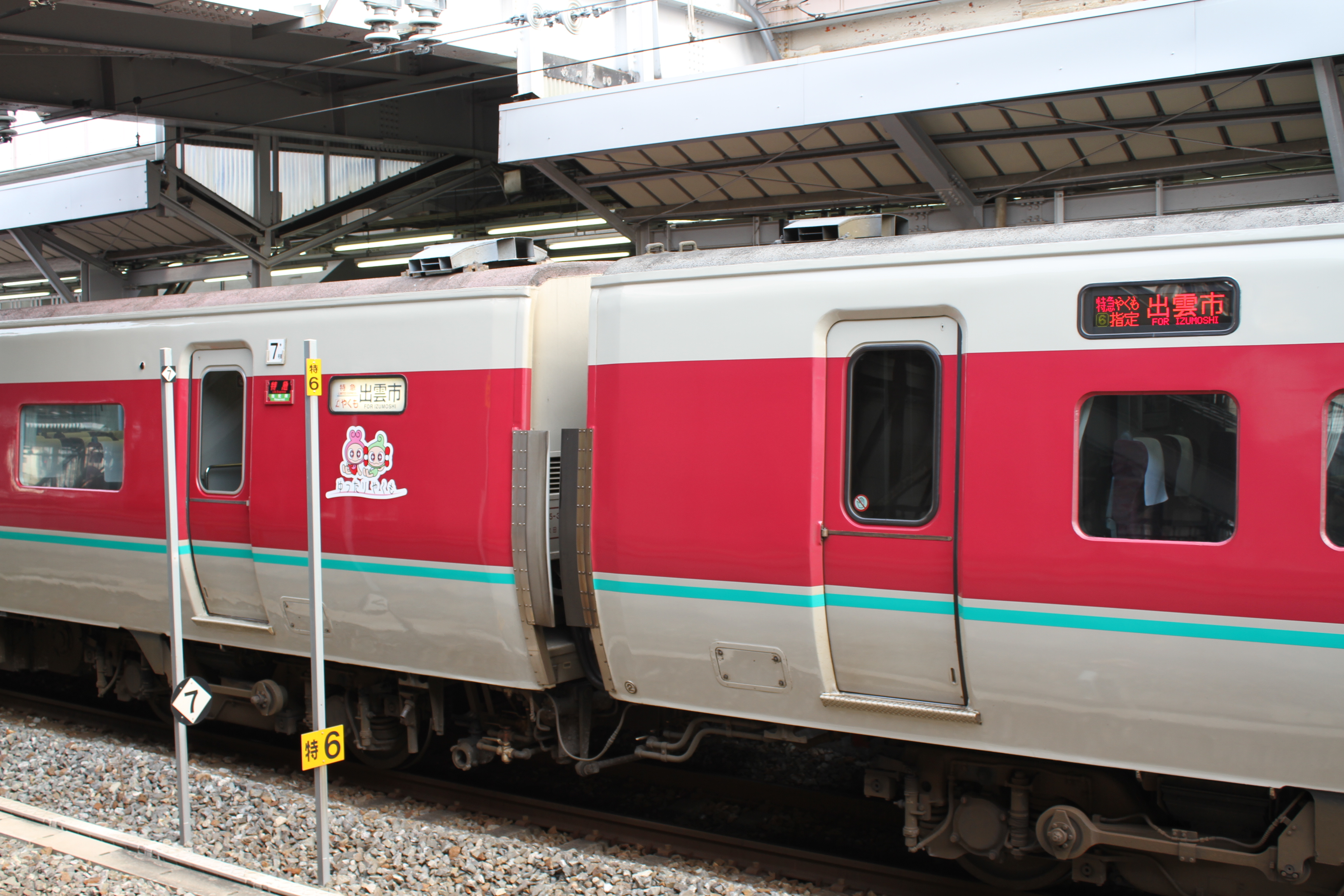 381系ゆったりやくも 転属車比較